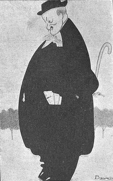 Cares barcelonines. Exposició Bagaria. Al "fayans catalá".